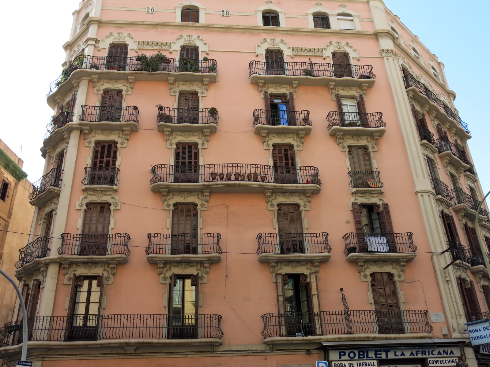 Detall de la façana del carrer Pere IV de l'edifici a Pere IV cantonada Sant Joan de Malta - Castella (Poblenou, Barcelona) anomenat "El Gurugú". L'edifici data de 1909 (signatura del projecte 21 d’agost de 1907). El nom de Gurugú se li va donar popularment en ser l'edifici més alt del barri en al·lusió a la muntanya de 890 metres que destaca a la costa rifenya i on havien mort en combat nombrosos soldats barcelonins que formaven part de les tropes colonials. La pressió dels llogaters pel mal estat de l'edifici va fer que el seu propietari Antonio de P. Martí i Casanovas els hi vengués l'any 1980 i entre 1983 i 1984 aquests van fer una primera rehabilitació i ja al 2002 una segona. Font: Andreu, Manel Celebració del centenari del GURUGÚ. Revista Poblenou, núm.59, setembre 2009, pàgina 13.